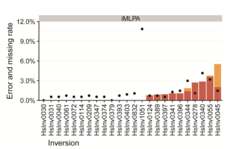 Errores biológicos y técnicos del iMLPA